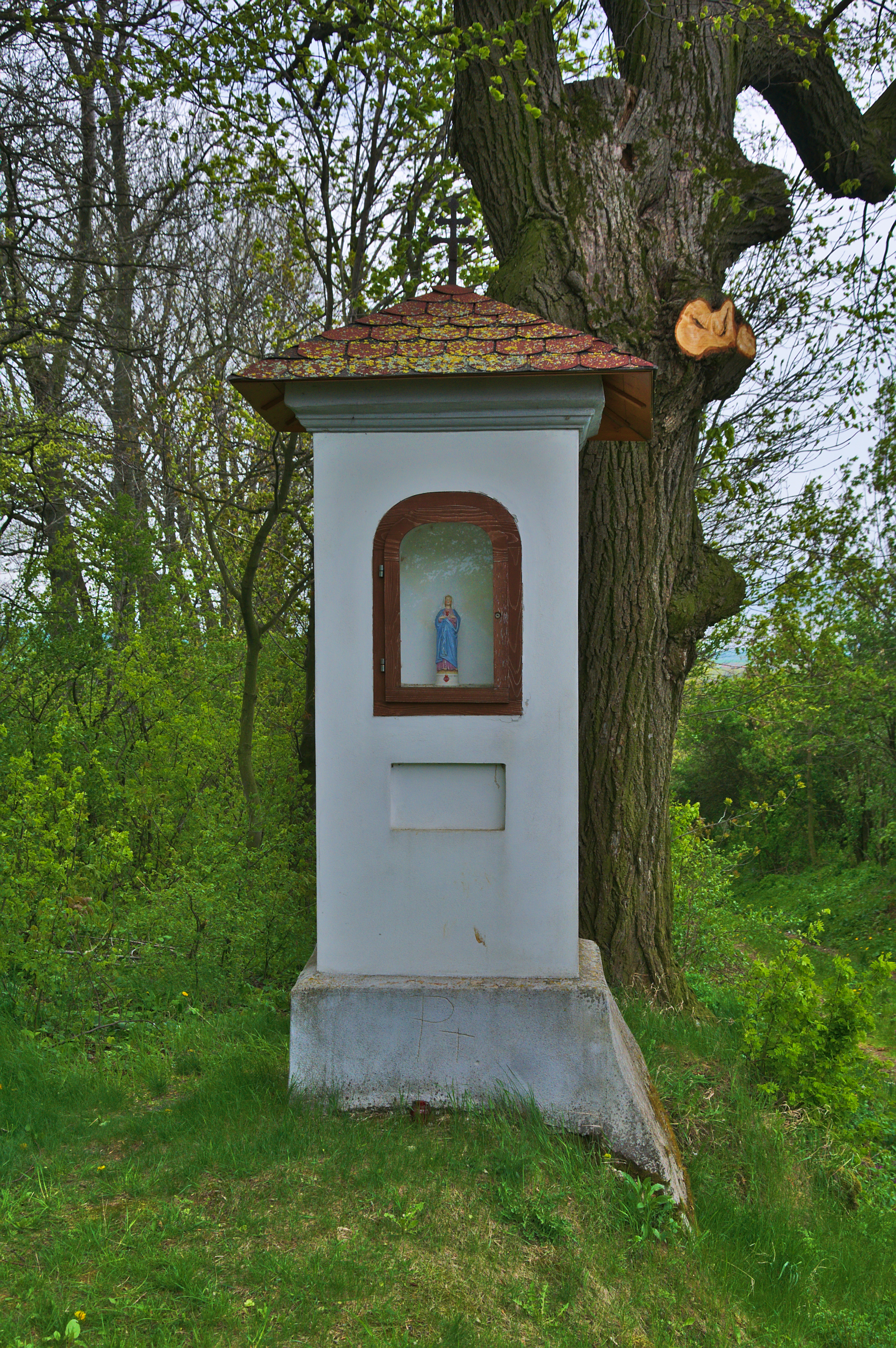 Boží muka u cesty k vodárně, Uhřice, okres Kroměříž